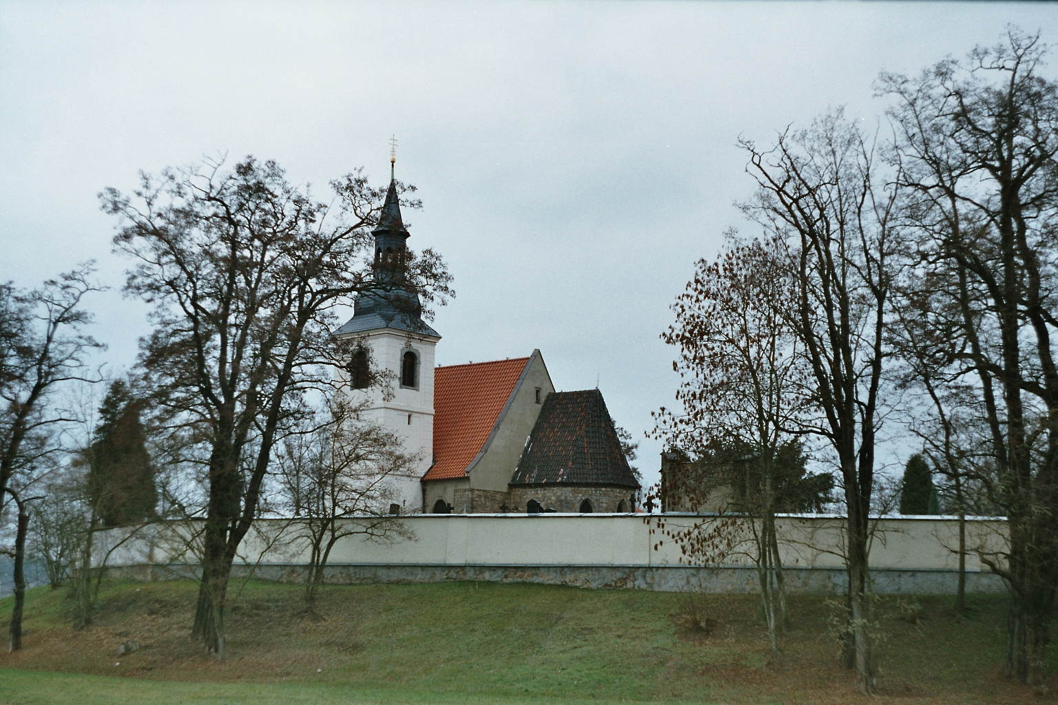 Kostel svatého Jiří a Panny Marie, Doubravka, Plzeň, Czech republic